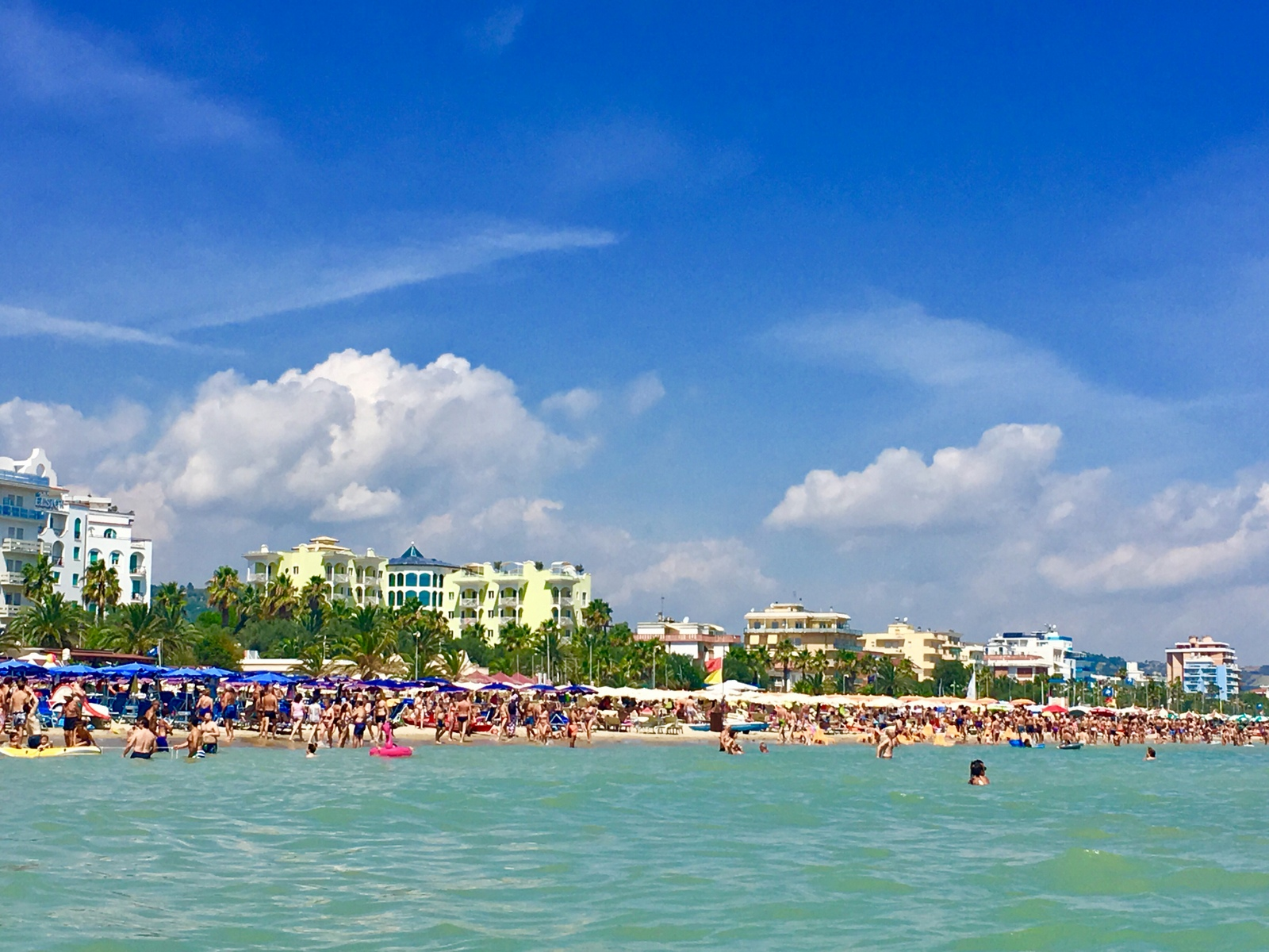 palma delle Canarie e Palma da datteri This is a photo of a monument which is part of cultural heritage of Italy.